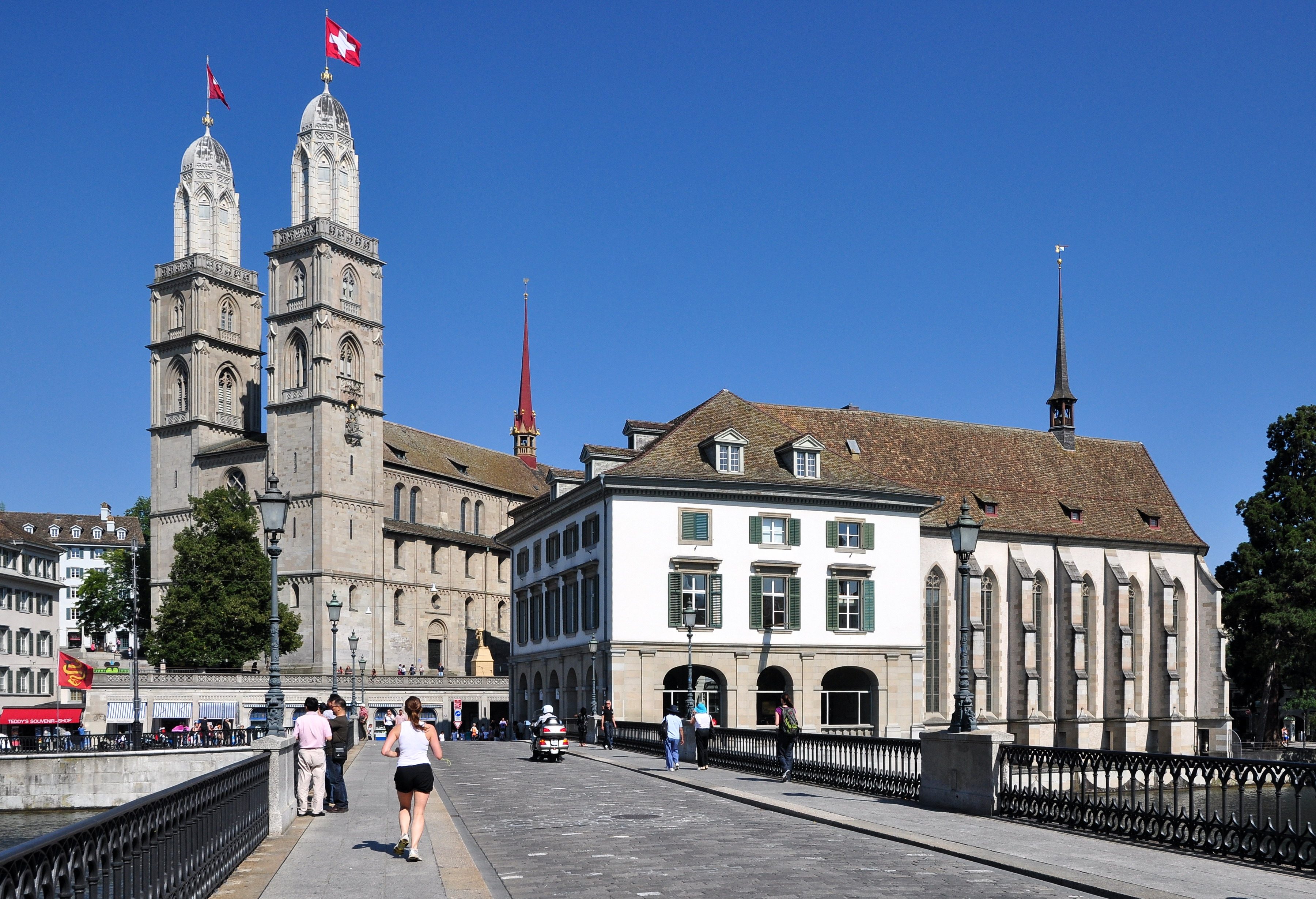 Grossmünster and Helmhaus-Wasserkirche at Limmatquai in Zürich (Switzerland), as seen from Wühre respectively Münsterhof, Münsterbrücke in the foreground.